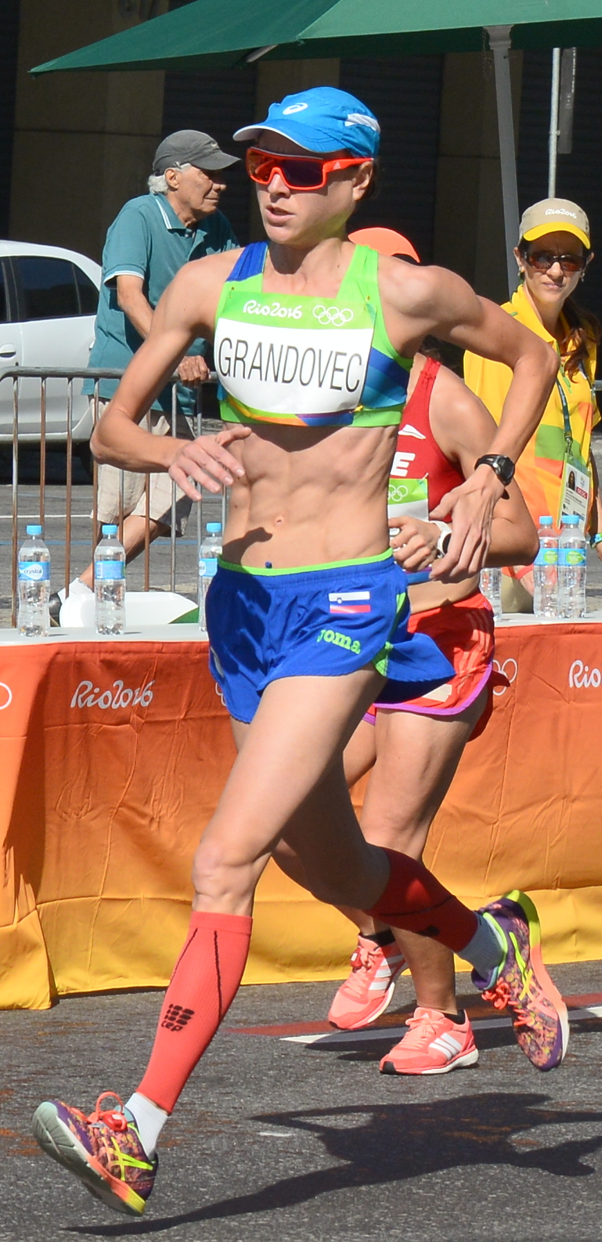 Passage du marathon des jeux olympiques de Rio 2016 dans le centre de Rio